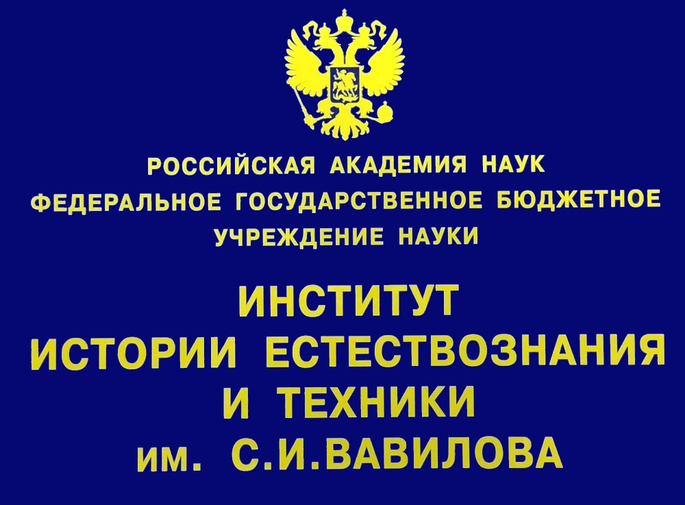 Институт истории естествознания и техники имени С. И. Вавилова РАН